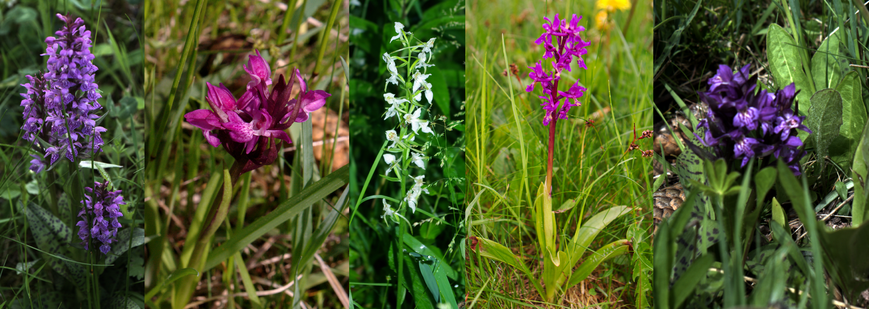 Verschiedene Orchideen aus dem Urseetal (eigene Fotos aus 2008 und 2009)